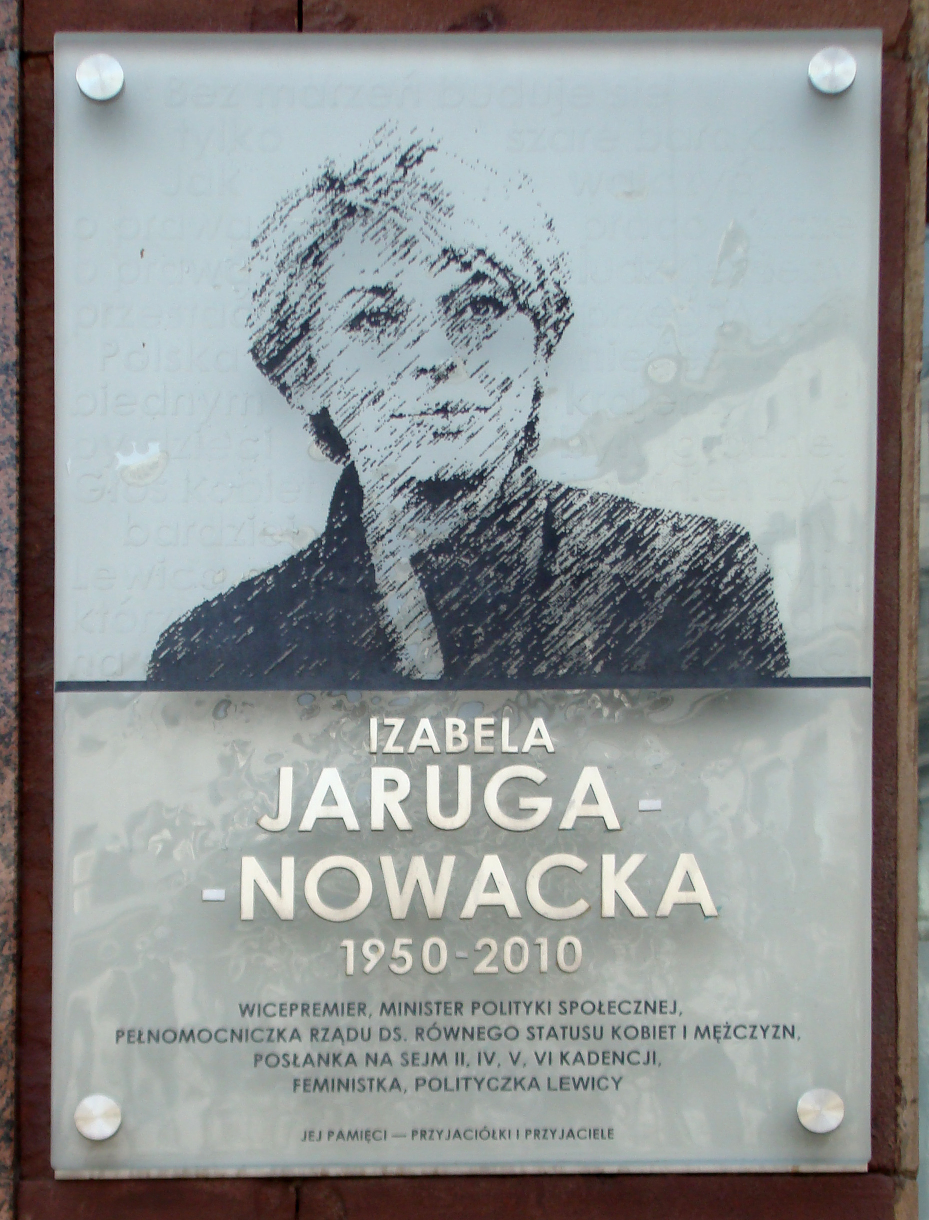 Izabela Jaruga-Nowacka, tablica pamiątkowa na Ministerstwie Pracy i Spraw Socjalnych.